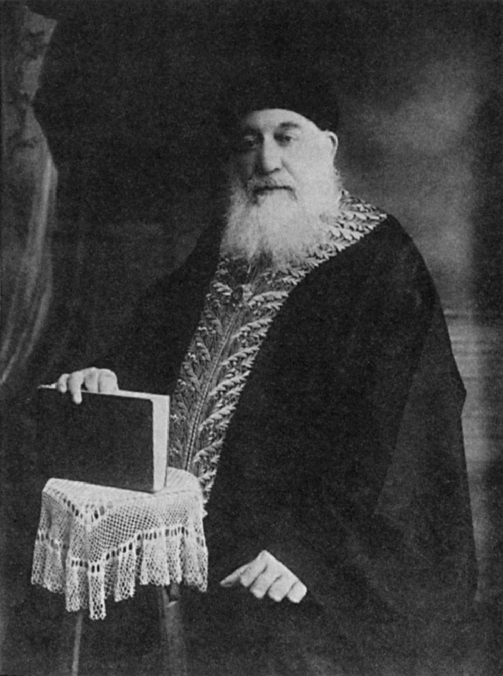 הרב חזקיה שבתי